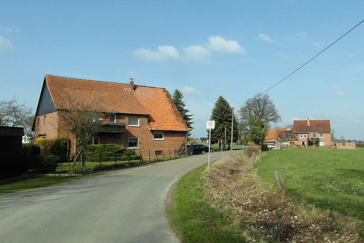 Südende der Ortslage Mathe von Hohnhorst, Landkreis Schaumburg, Niedersachsen